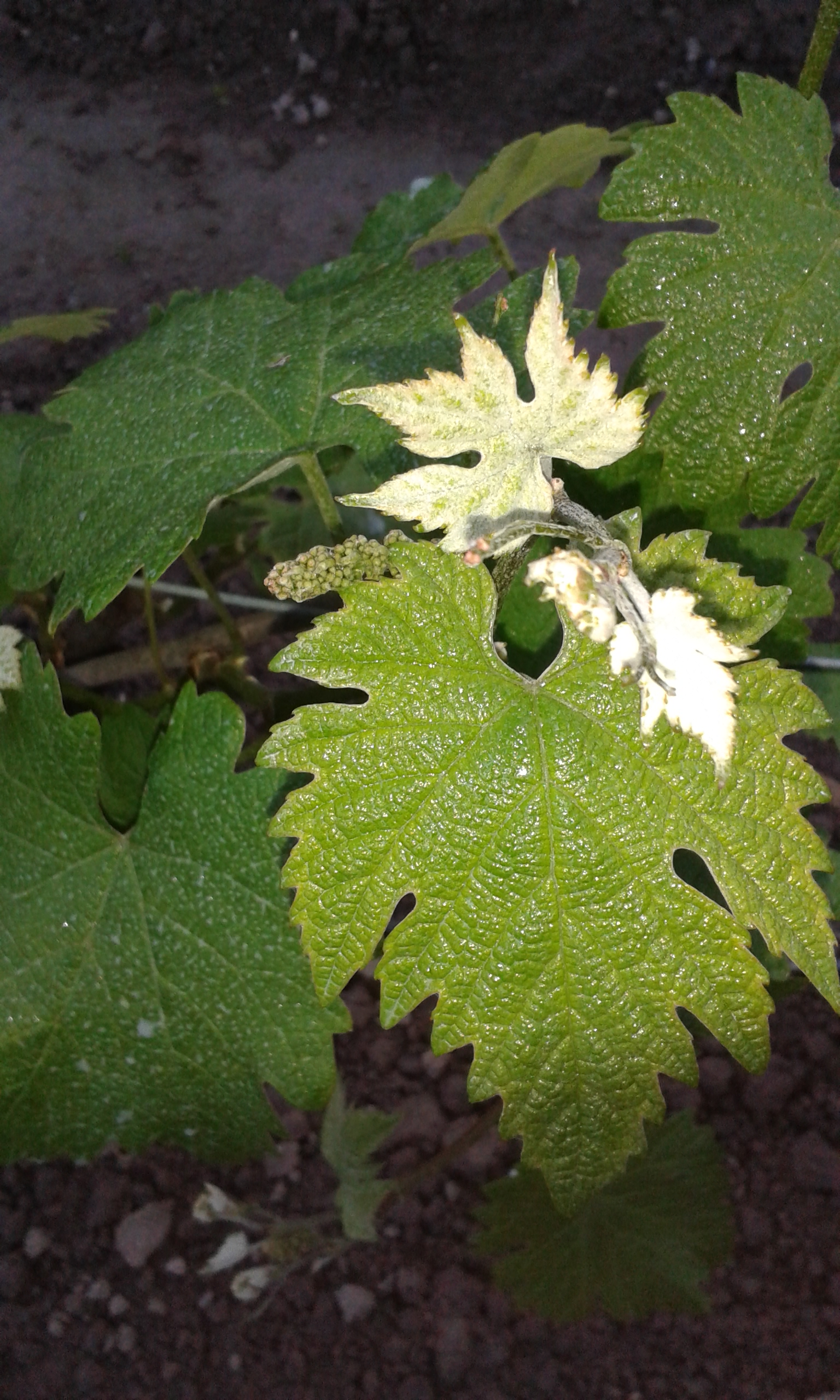 raboso